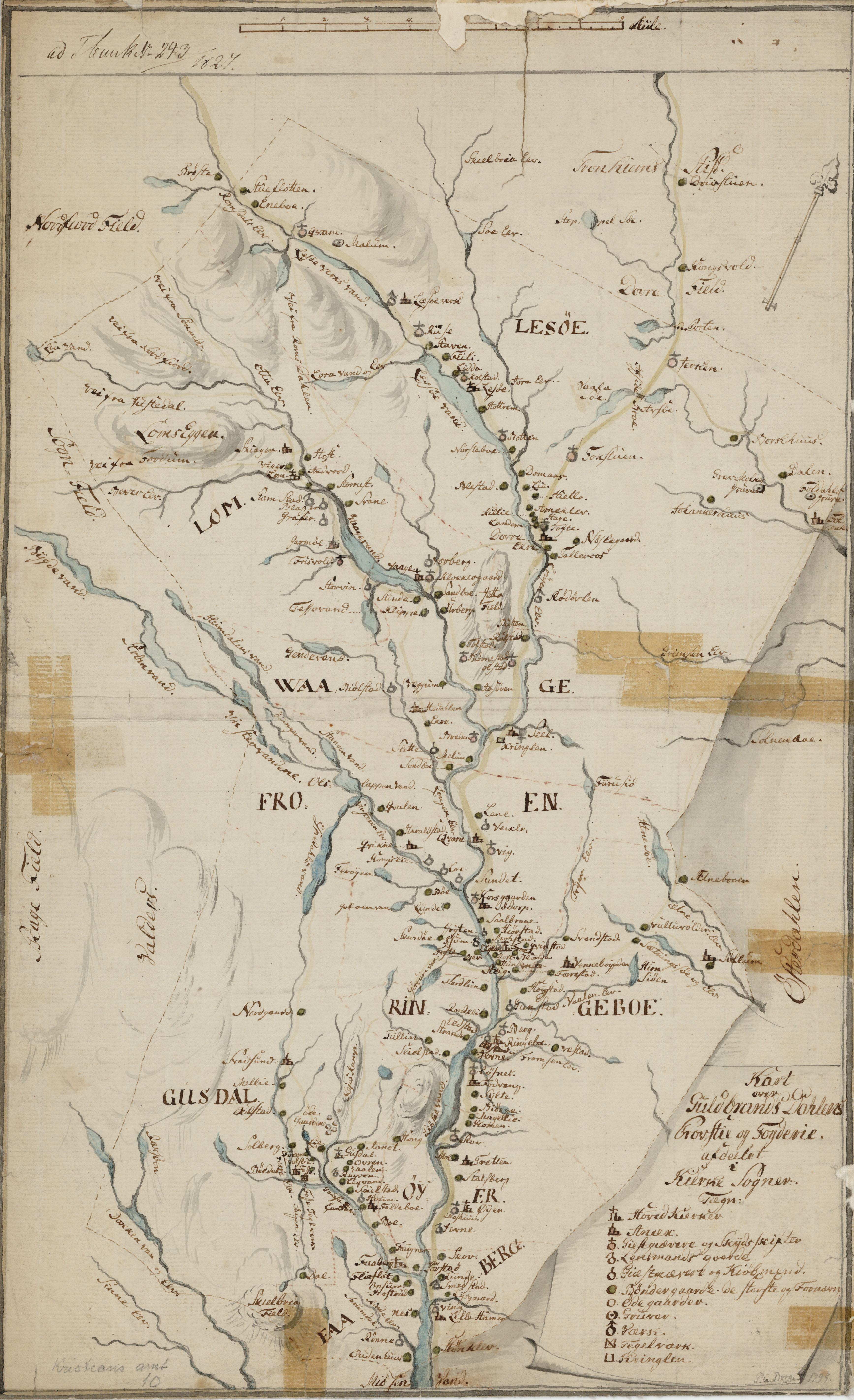 Kart over Gulbrands Dahlens Provstie og Fogderie afdeelet i Kiercke Sogner.